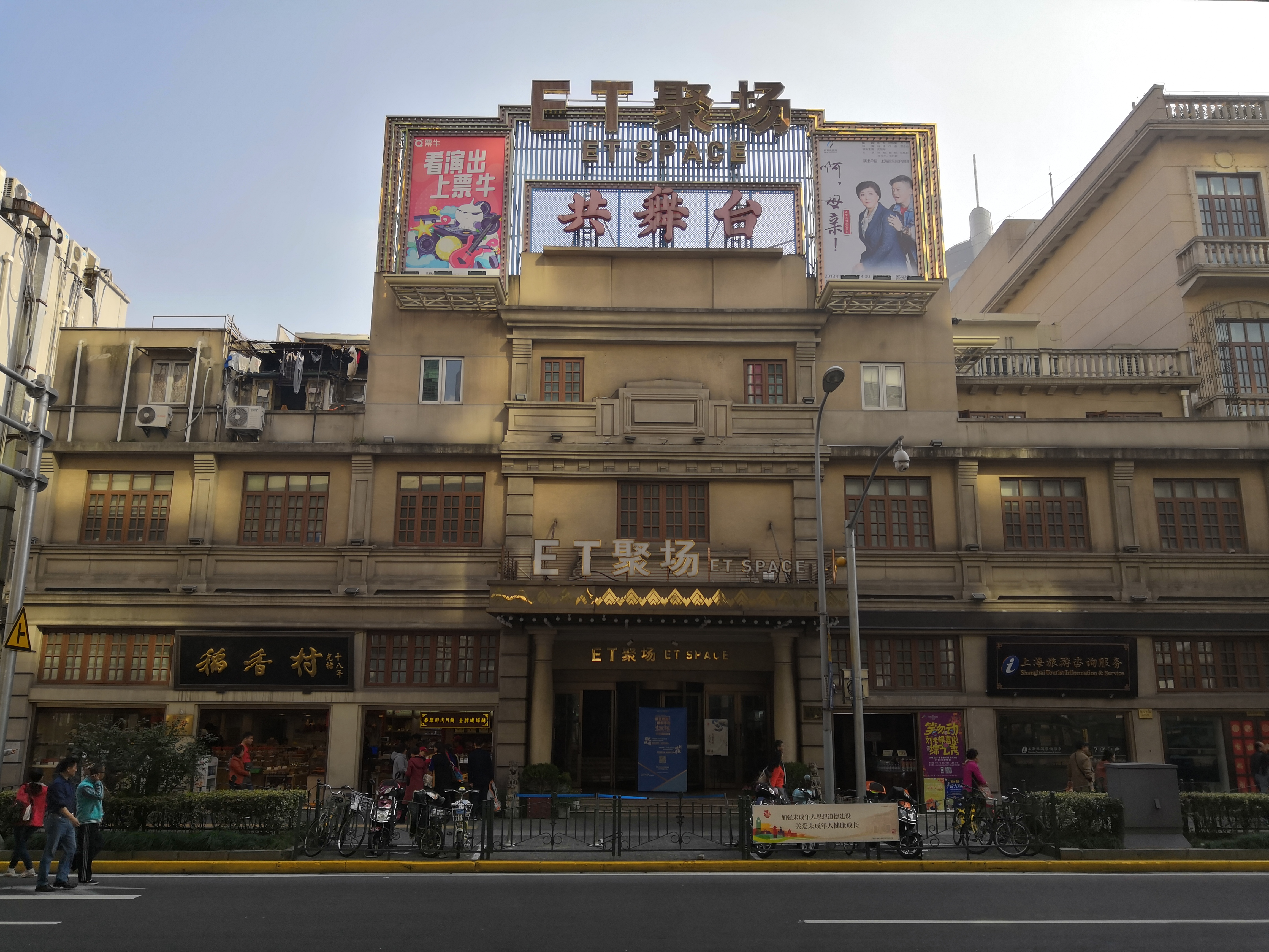 中文（中国大陆）: 延安东路共舞台